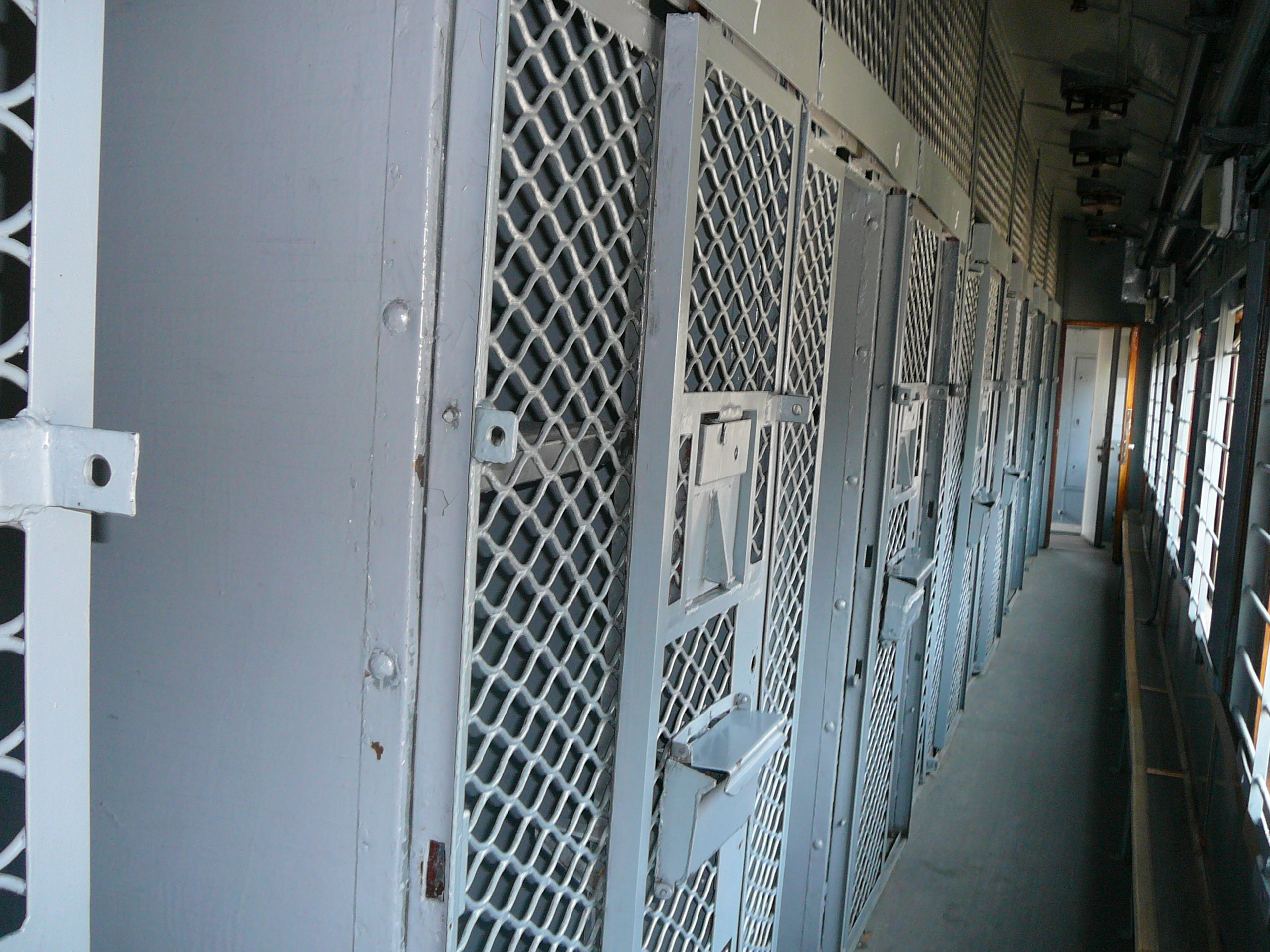 Вагон для перевозки заключенных (специализированный пассажирский вагон для спецконтингента) в Новосибирском музее железнодорожной техники. Согласно карточке экспоната: Масса вагона (тара) без экипировки 50 т, Конструкционная скорость до 160 км/ч, Количество мест служебных 10, для спецконтингента 75. Конструкция вагона обеспечивает перевозки в условиях умеренного климата. Вагон оборудован сигнализацией и трансляционной радиосетью. Запас воды 1000 л, установлен продвагонный ящик для продуктов и плита в кухне. Построен в 1969 году. Подготовлен и передан в музей Кемеровским отделением Западно-Сибирской железной дороги в 2009 году.